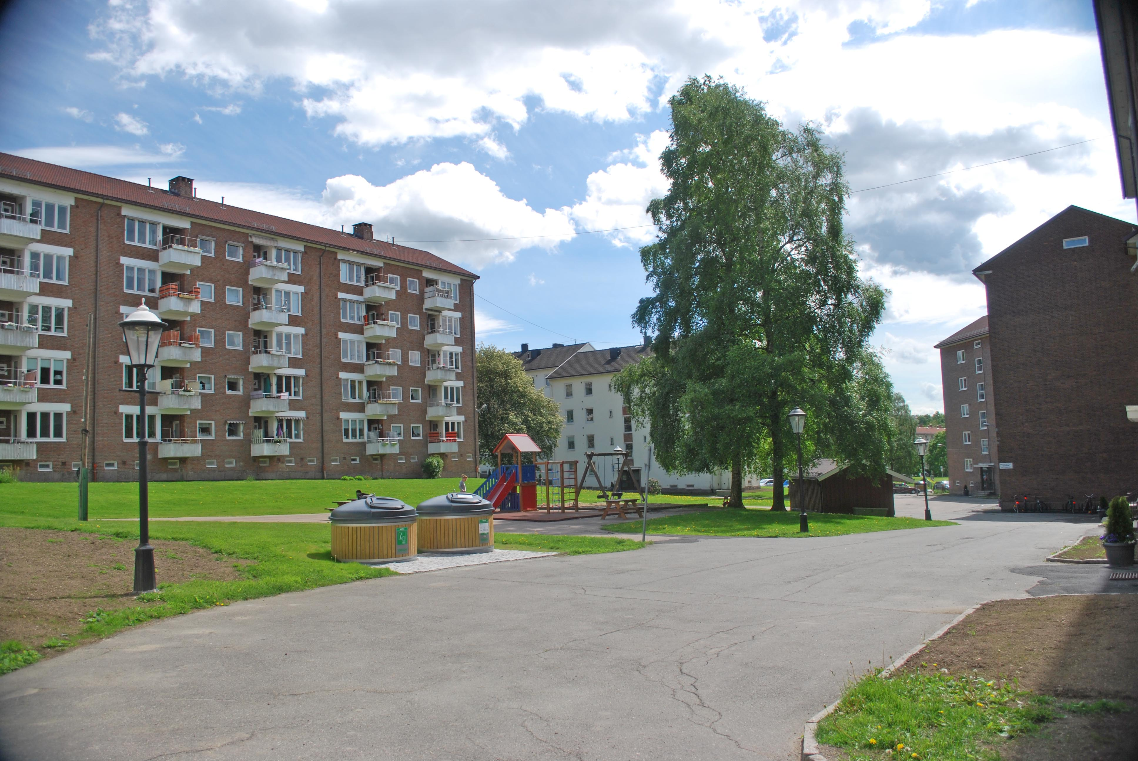 Bebyggelse fra 1940-årene på Carl Berner, Ola Narr 18 til 22 til venstre og 6 og 10 til høyre